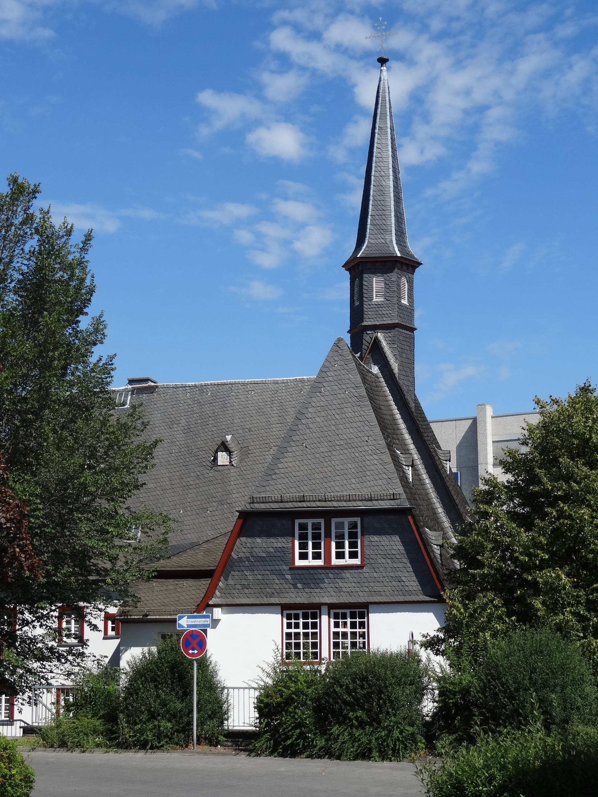 Ehemalige Hospitalkapelle St. Wendelin (Butzbach)